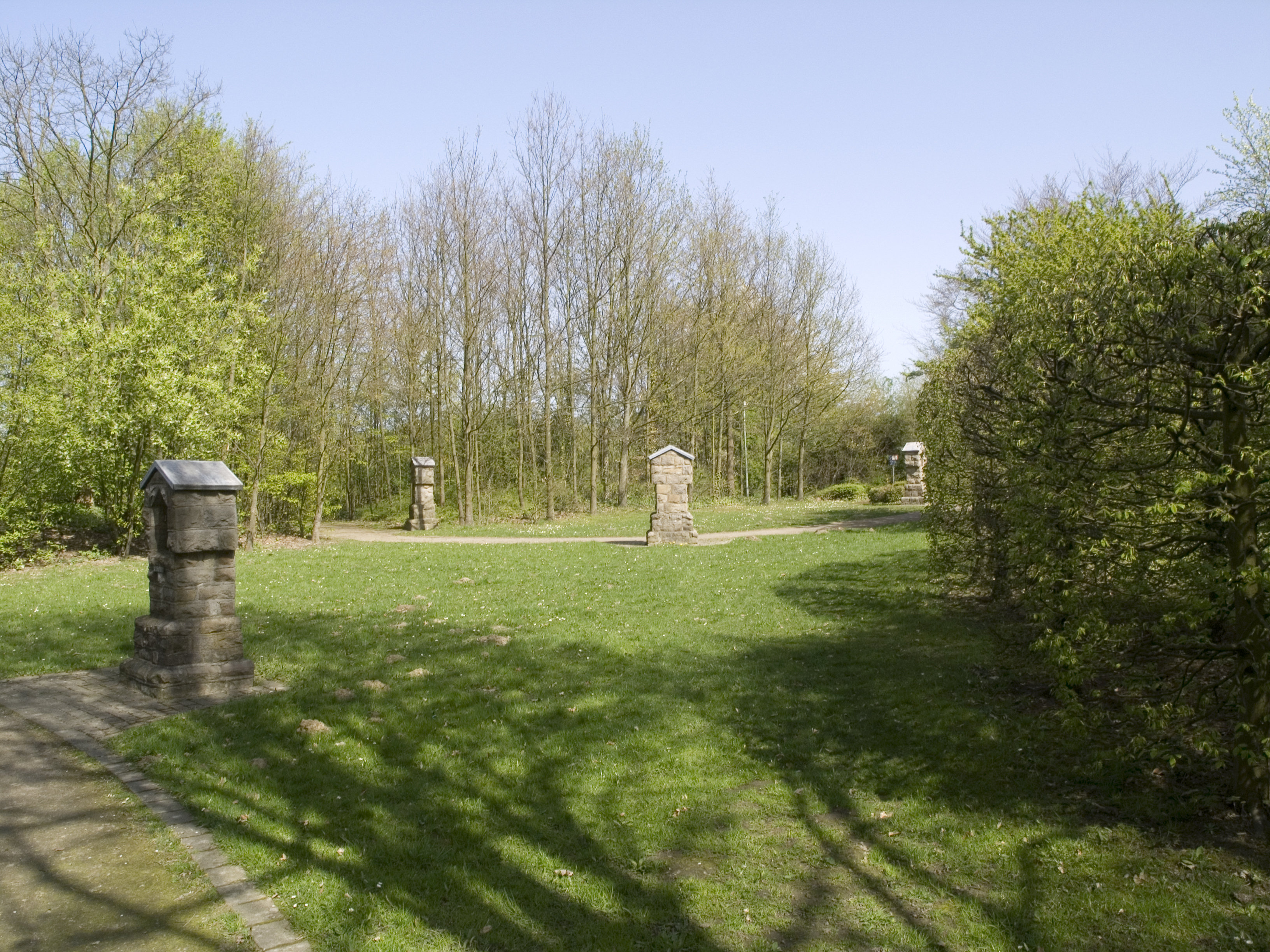 Северный Рейн - Вестфалия, Бохум - Цистерцианский монастырь в Штипеле